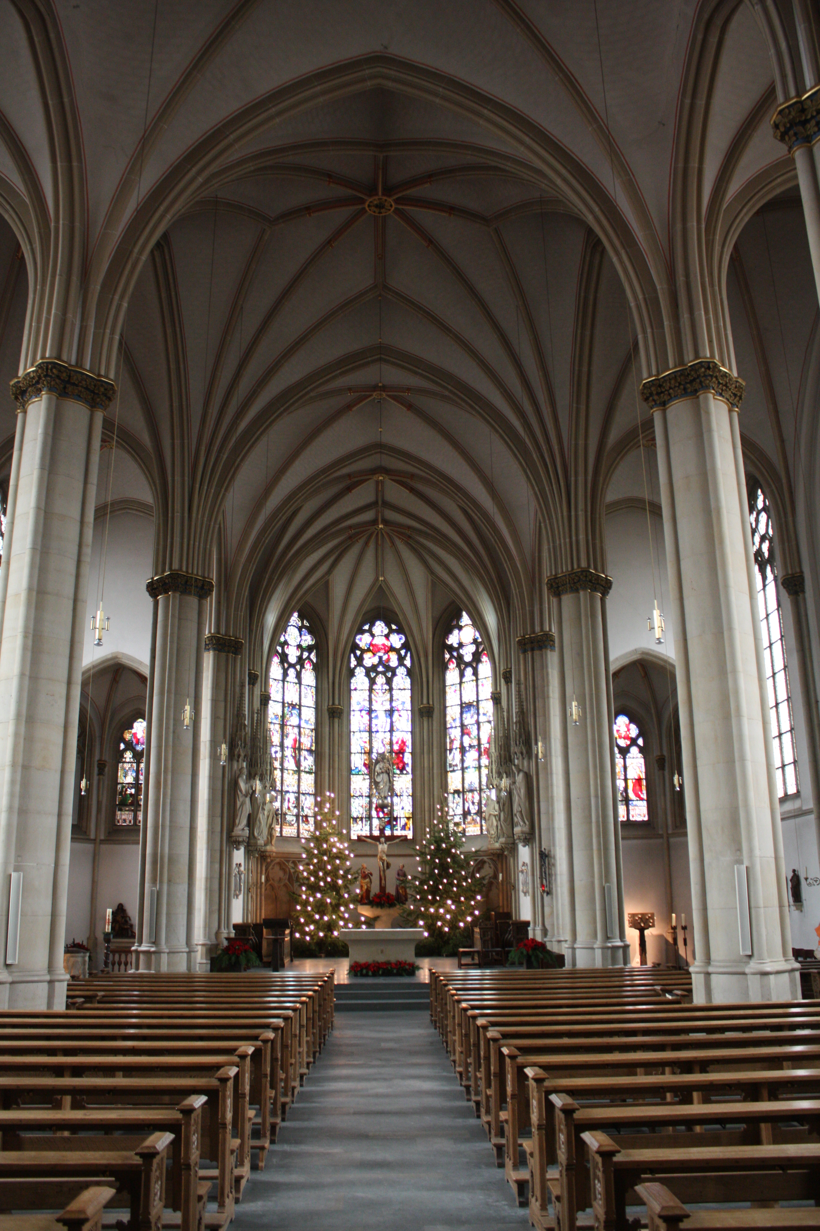 Chorraum von St. Pantaleon, Münster-Roxel